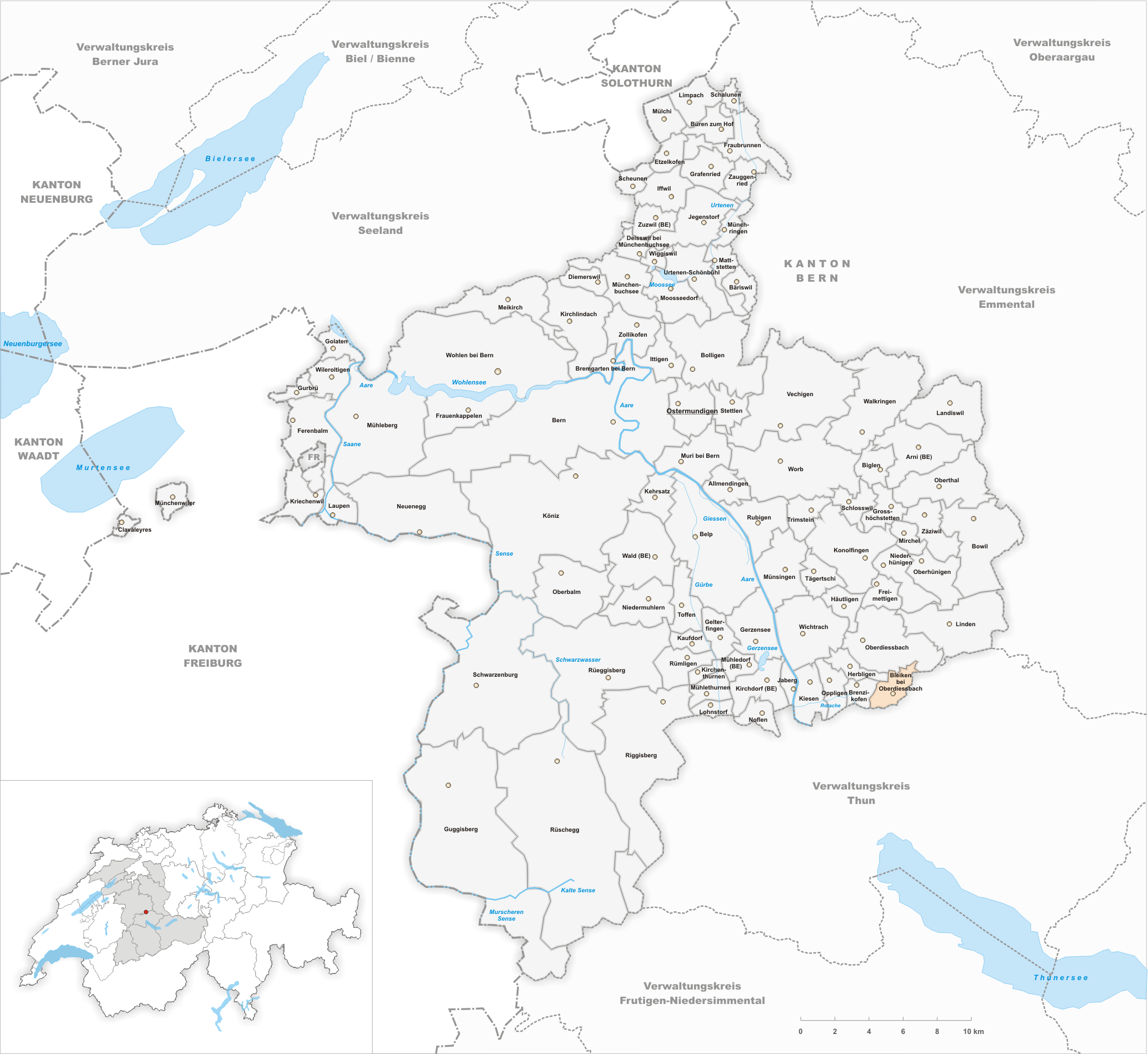 Municipality Bleiken bei Oberdiessbach